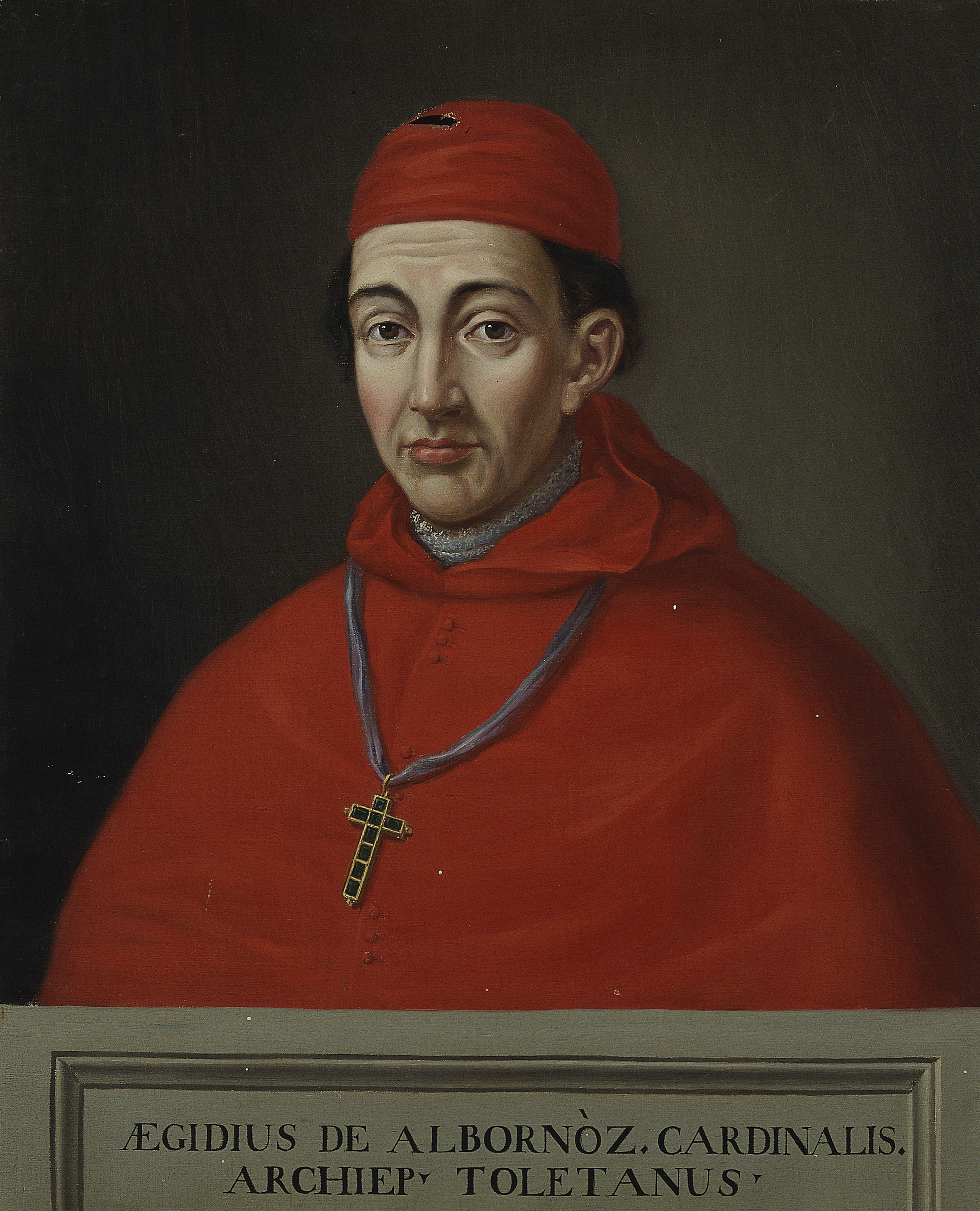 Retrato del eclesiástico español Gil Álvarez de Albornoz (1302-1367), que llegó a ser cardenal de la Iglesia Católica y arzobispo de Toledo. Esta obra es una copia decimonónica de un retrato del cardenal que se conservaba en la Sala capitular de la catedral de Toledo.